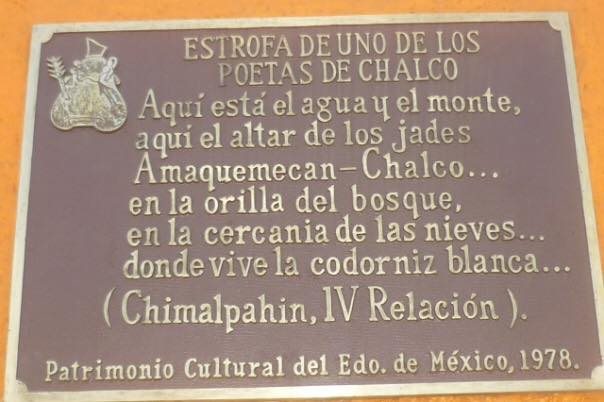 Placa de inaguración Chimalpahin